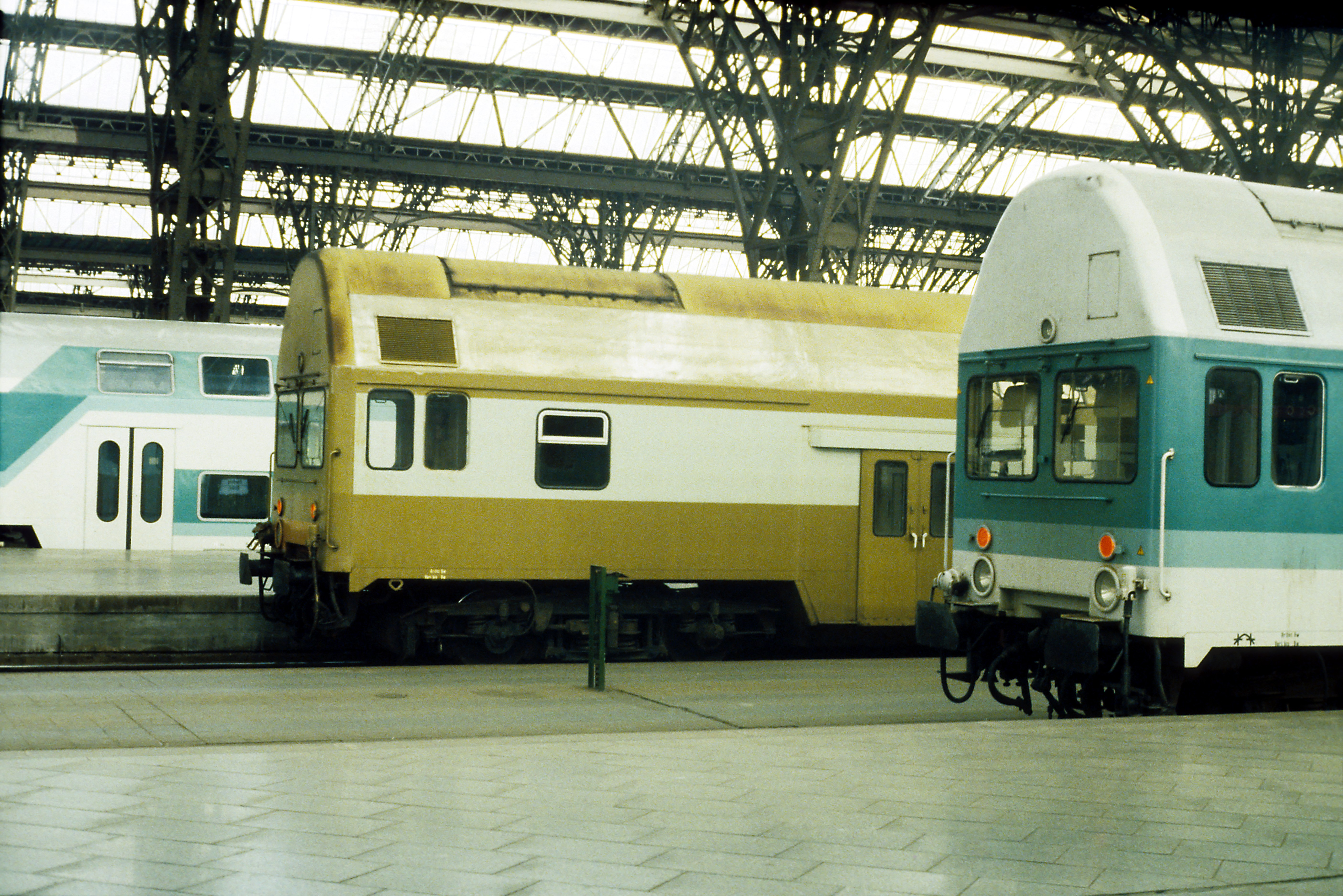 Doppelstocksteuerwagen in Serien-Ursprungsausführung, rechts schon im seinerzeit neuen Regionalverkehrsanstrich.